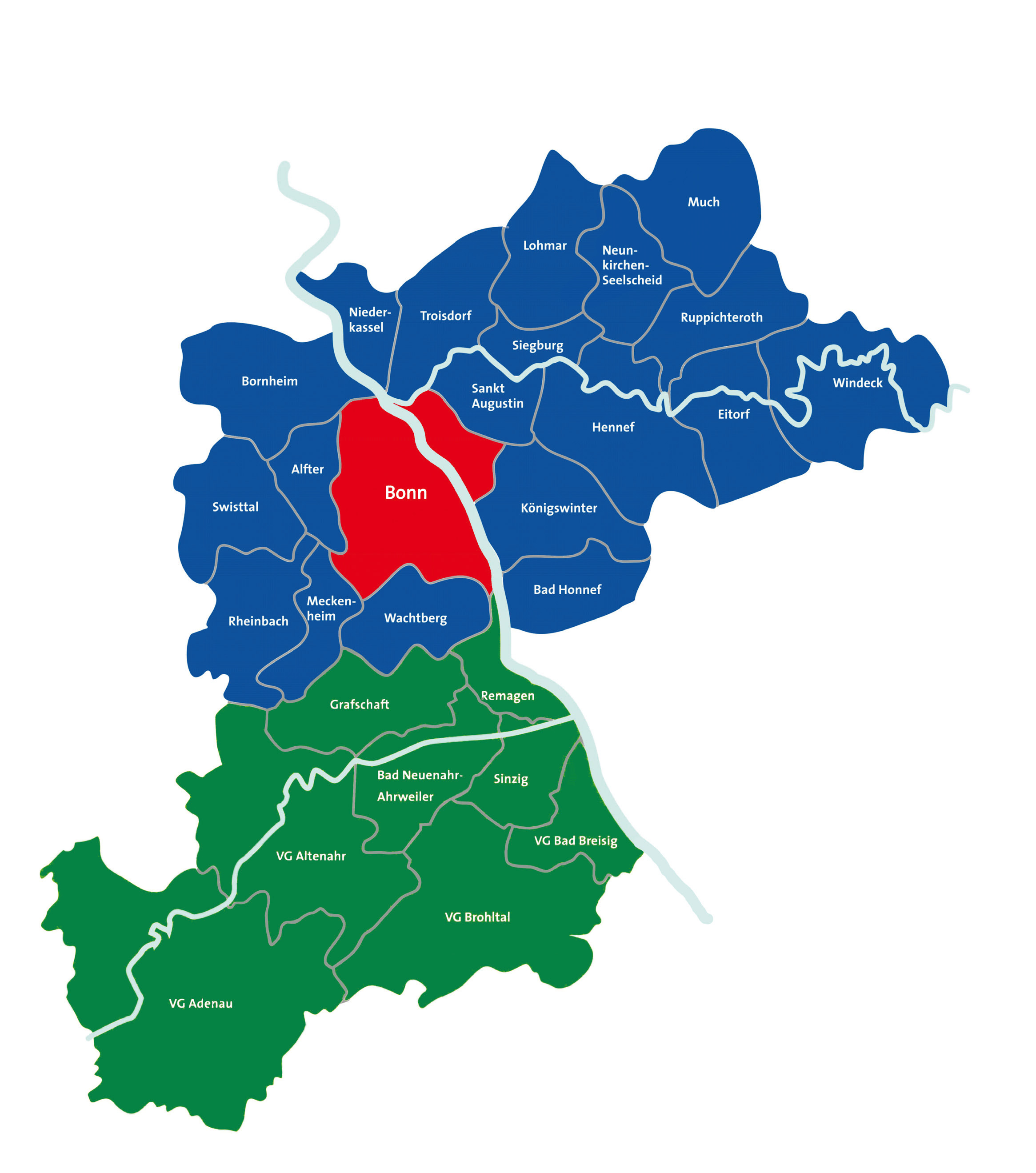 Karte des :rak 2020